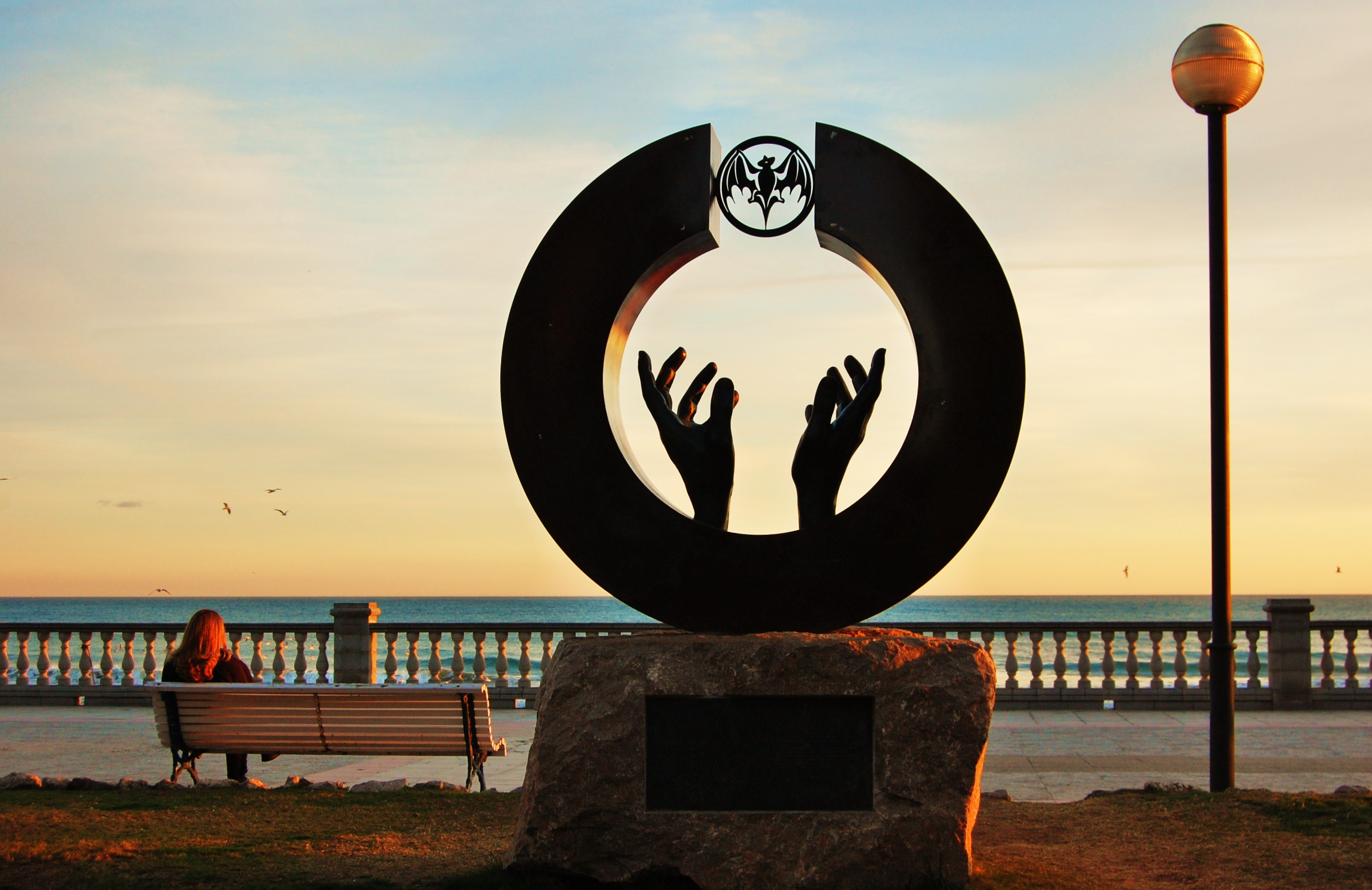 "Mirant el futur", de Lorenzo Quinn. Tribut de Sitges al fundador de Bacardí, Platja de la Ribera This is a a photo of a beach in Catalonia, Spain, with id: PL-CT-17003-296